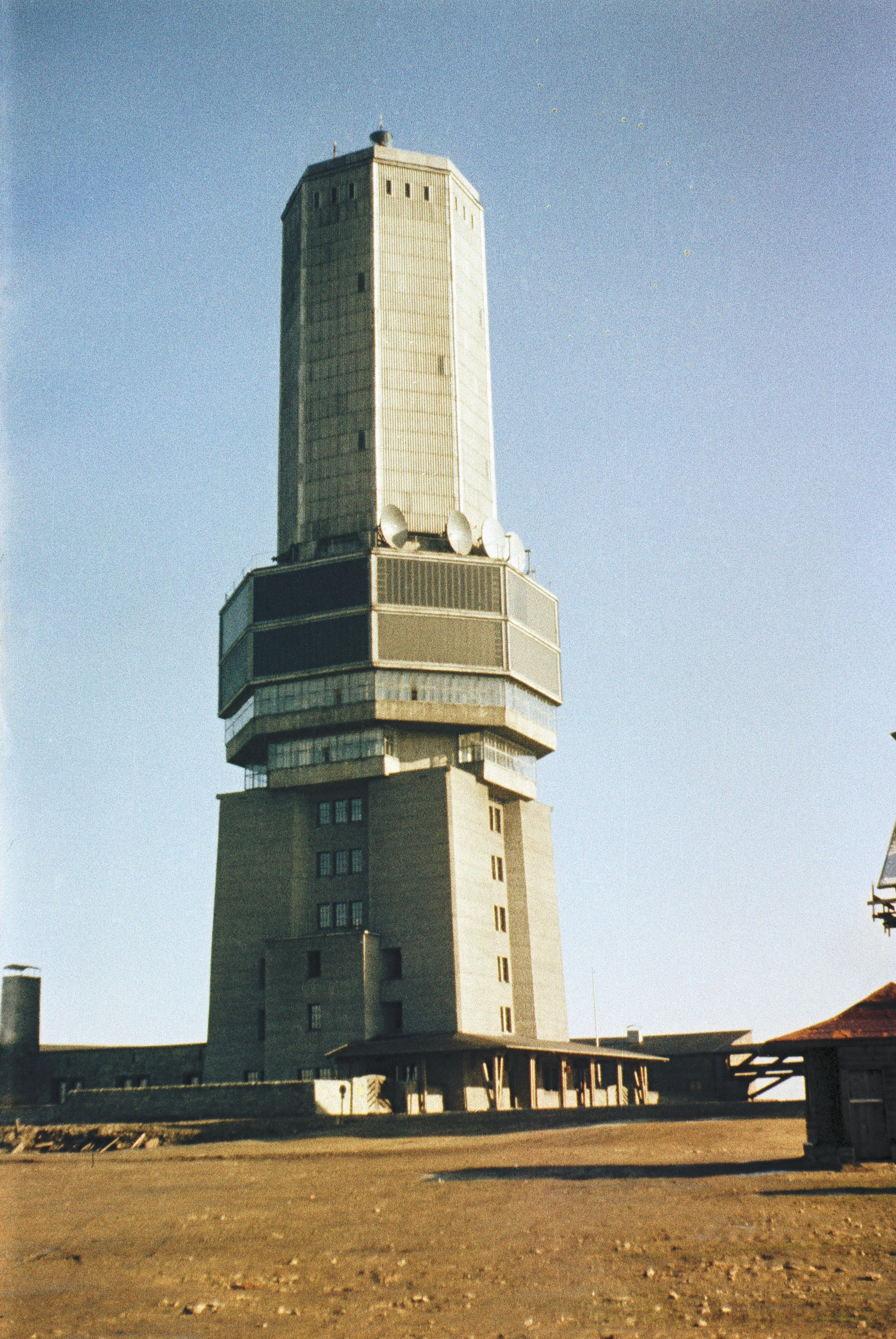 Sender Großer Feldberg, Taunus. 1953